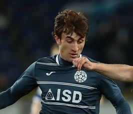 Гор Шаваршевич Малакян